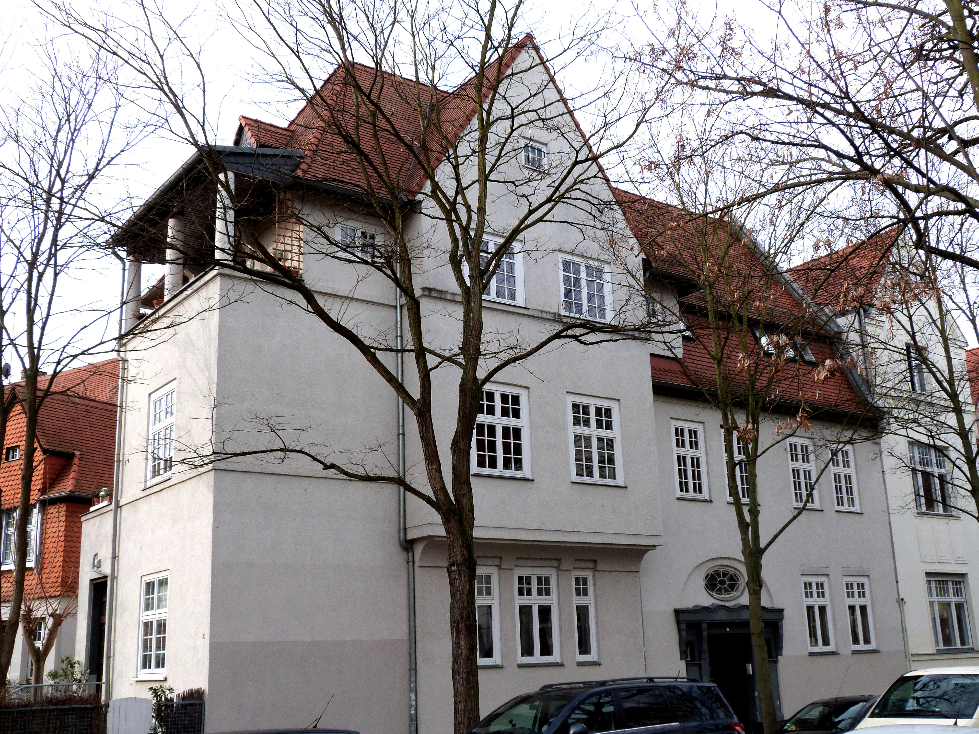 Rathenauplatz 5, Halle (Saale)